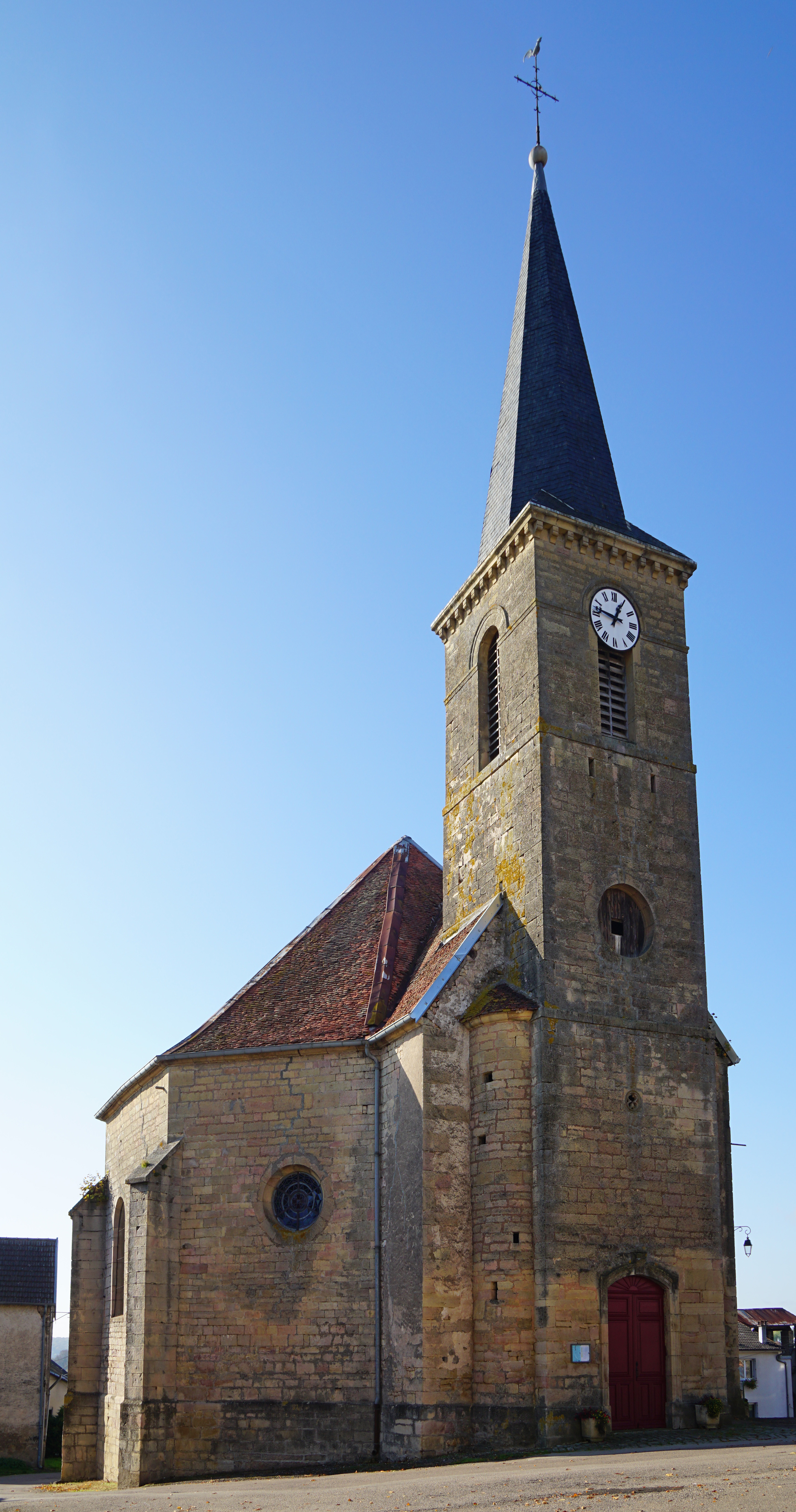 L'église de Neurey-en-Vaux.